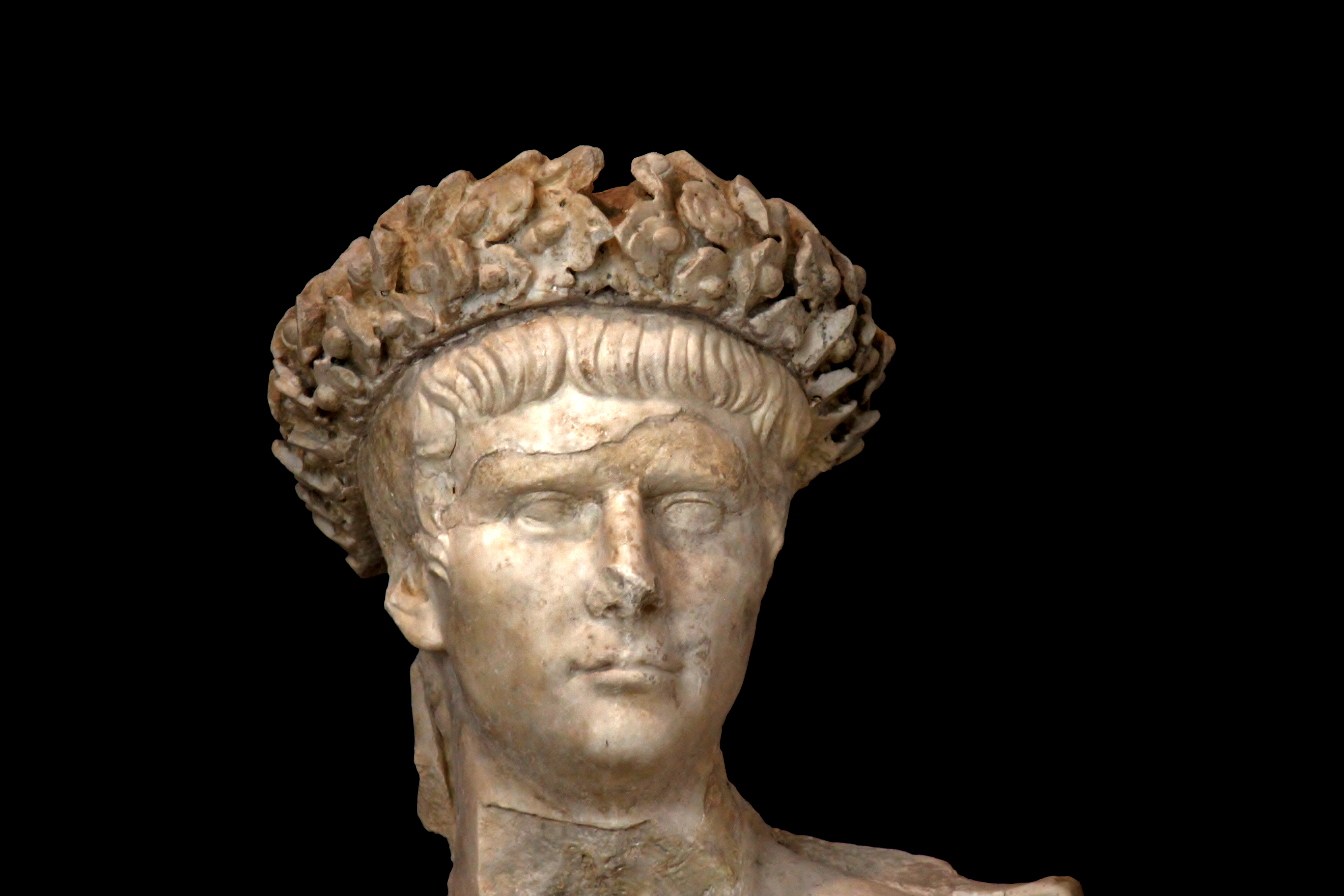 buste de Claude, type Cassel dit "de l'avènement" - musée de Vaison la romaine